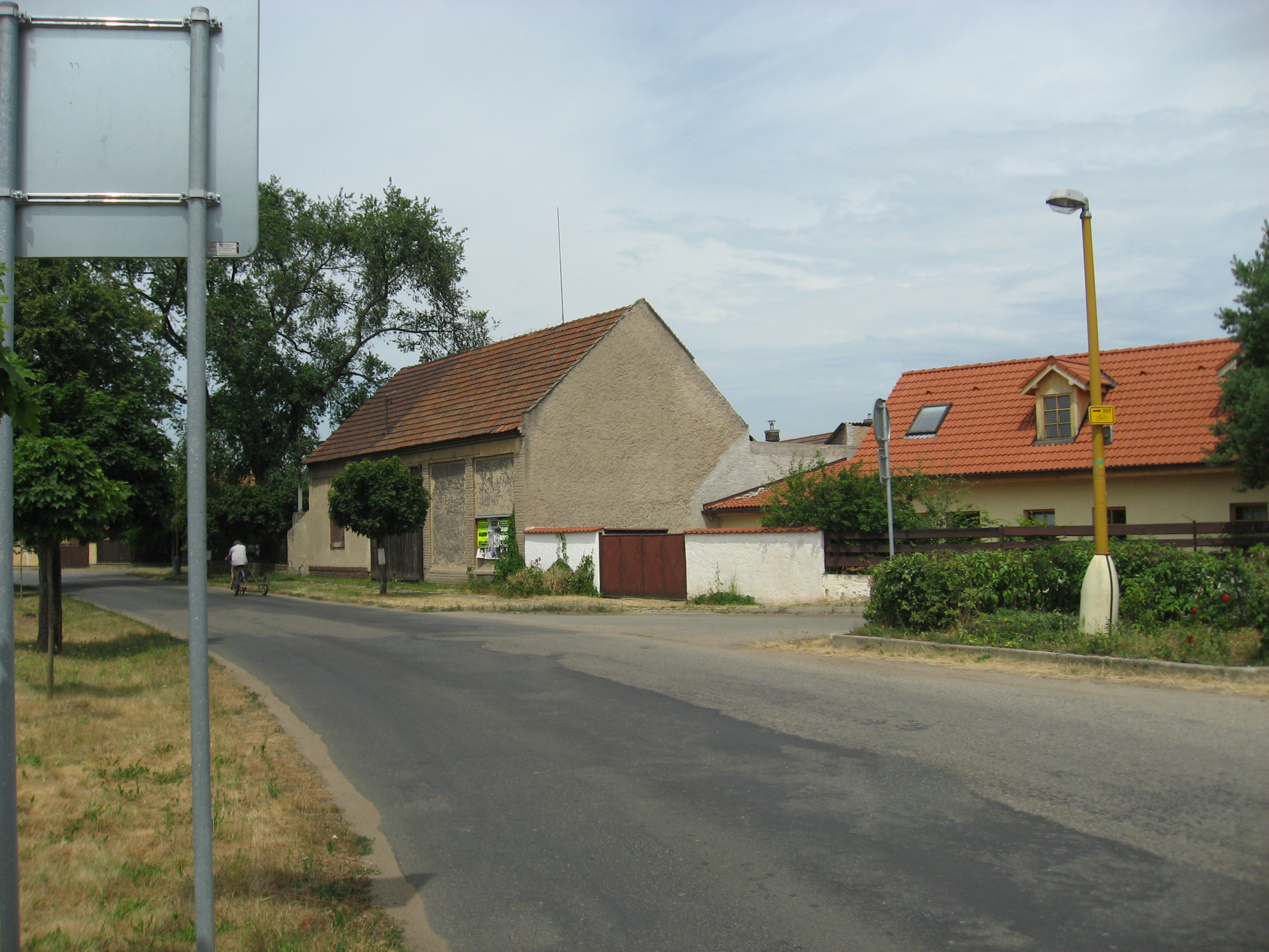 Lhota